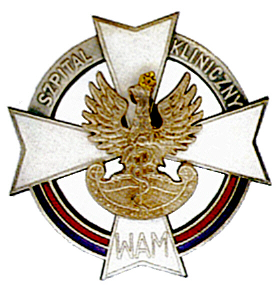 Wzór II z 1992 r, wg. proj. Z. Dutkiewicza, K. Zieleniewa i K. Kijewskiego, zatwierdzona przez Ministerstwo Obrony Narodowej. Contents 1 Licensing 2 Źródło 3 Licensing 4 Original upload log Licensing Źródło Własna praca Kwz